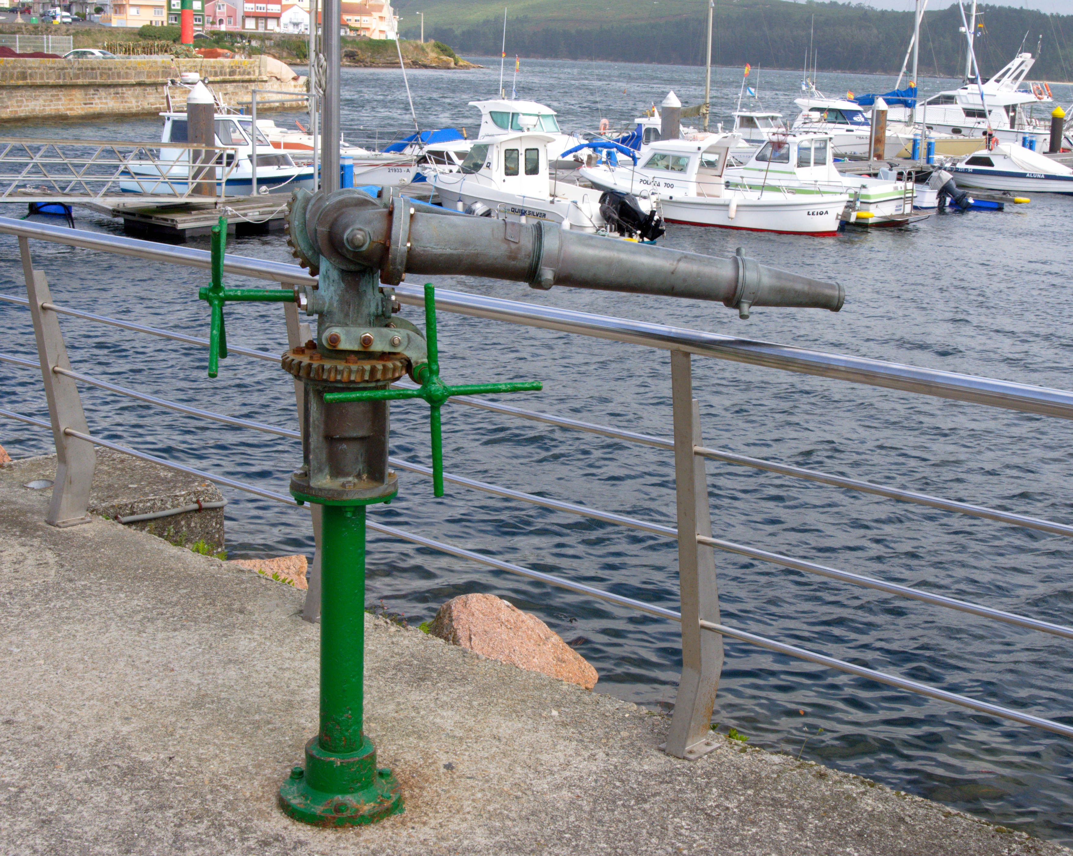 Puerto de Camariñas, Galicia, viejo arpón para cazar ballenas